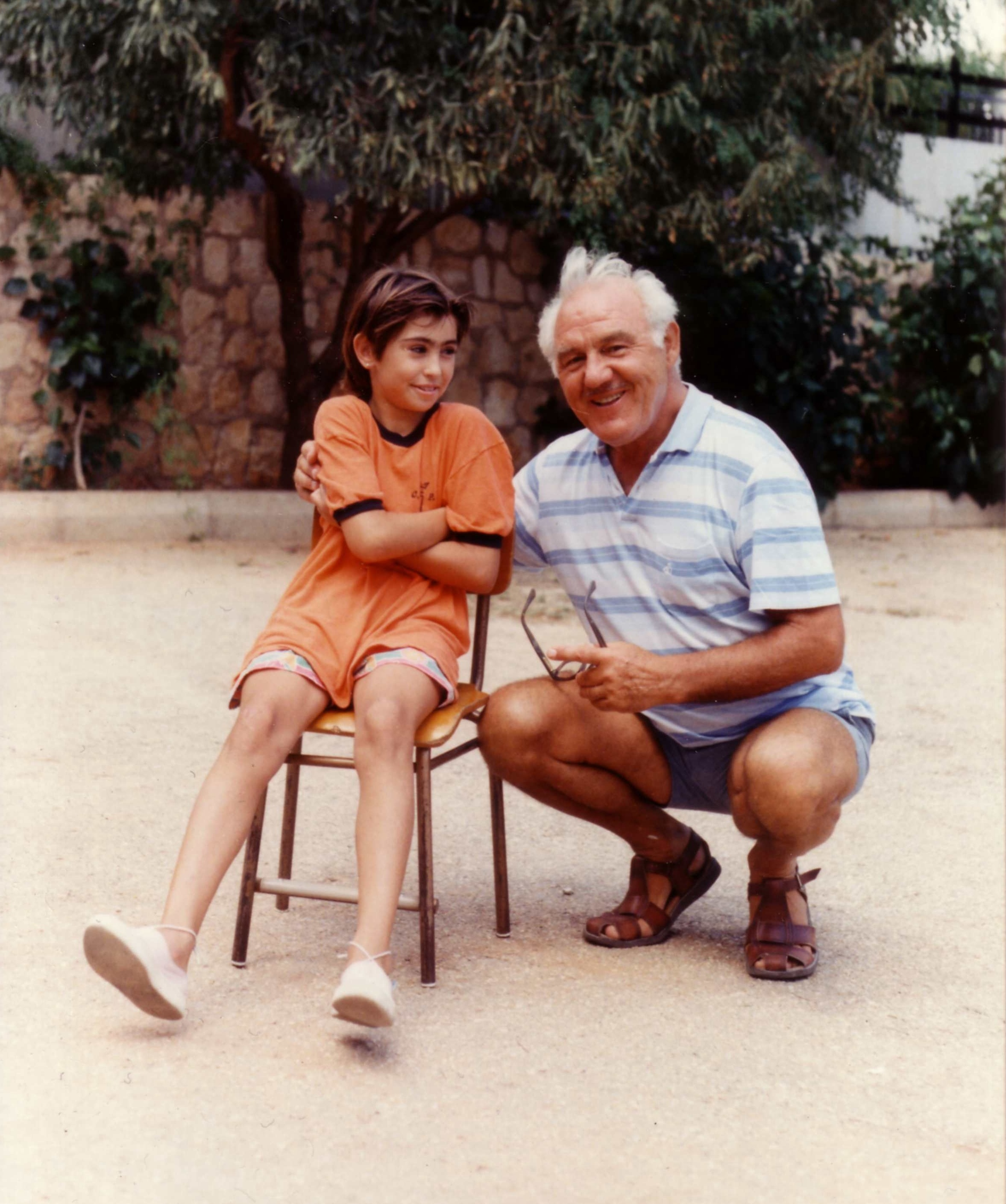 Der Kontrabassist Ludwig Streicher in Xabia, Alicante, Spanien im August 1988, wo er zwei Kontrabasskurse gab.